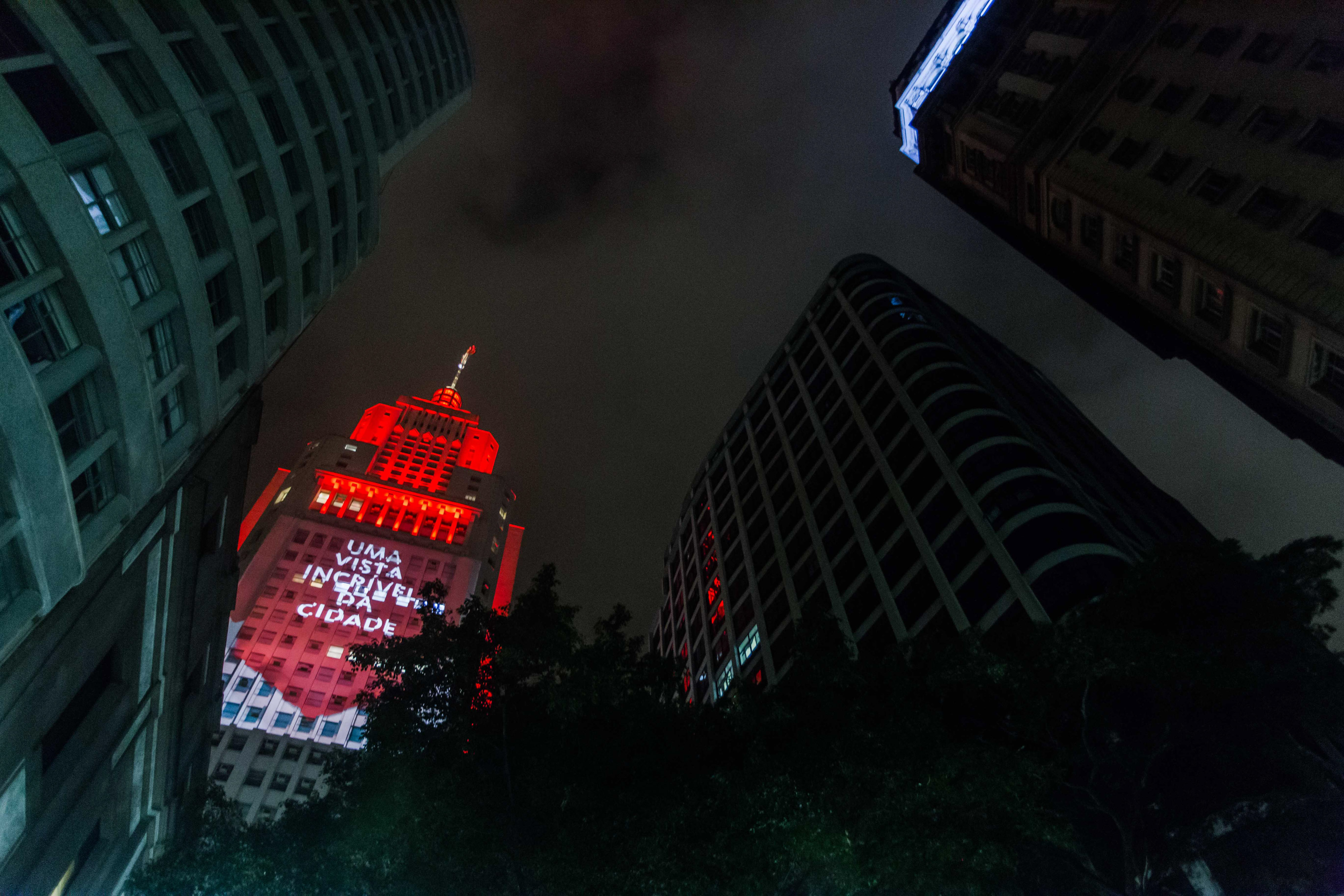 O governador Geraldo Alckmin participou da INAUGURAÇÃO DO EDIFÍCIO FAROL SANTANDER. Local: São Paulo/SP. Data: 25/01/2018. Foto: Alexandre Carvalho/A2img